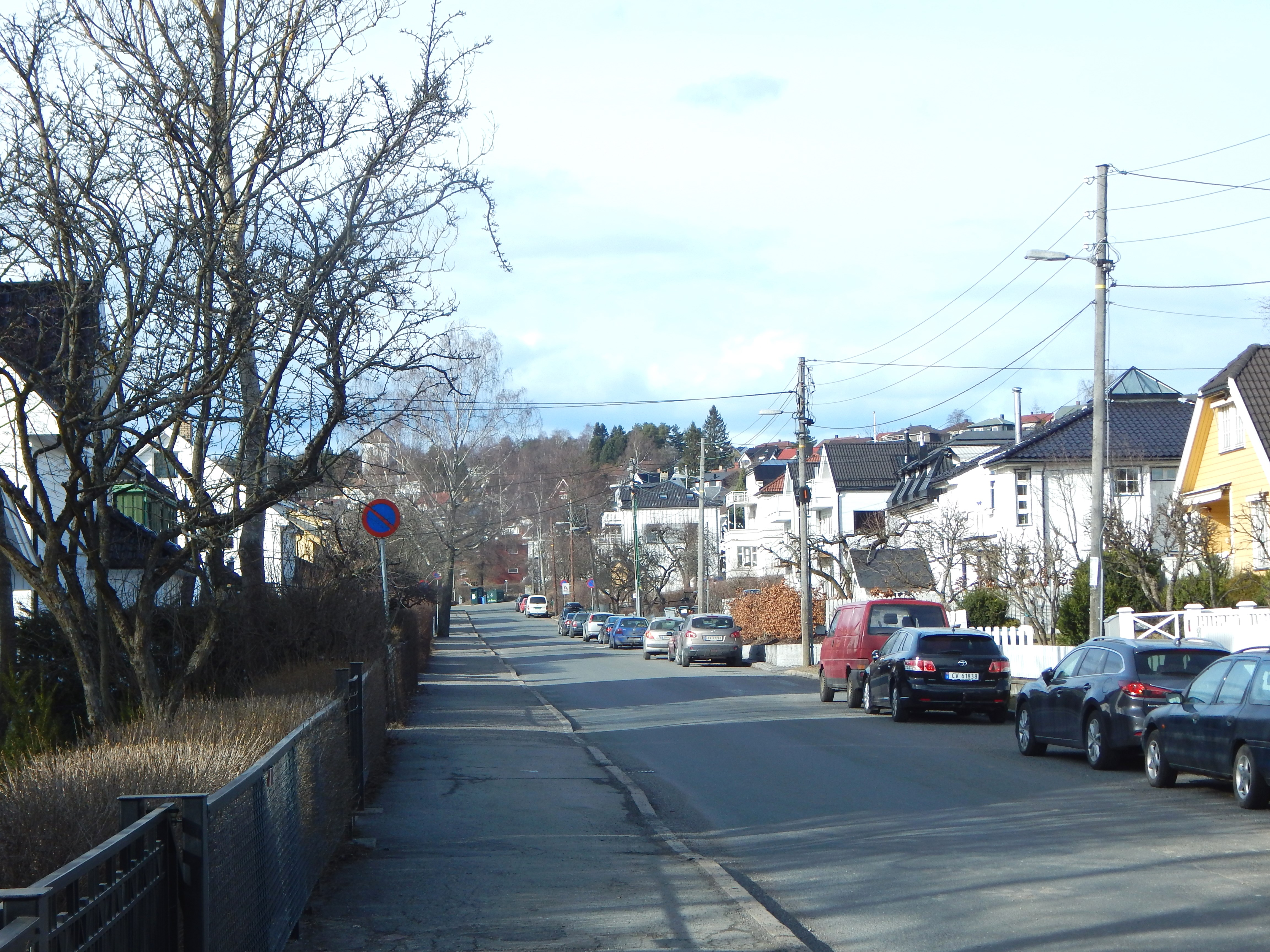 Kapellveien nær Grefsenveien